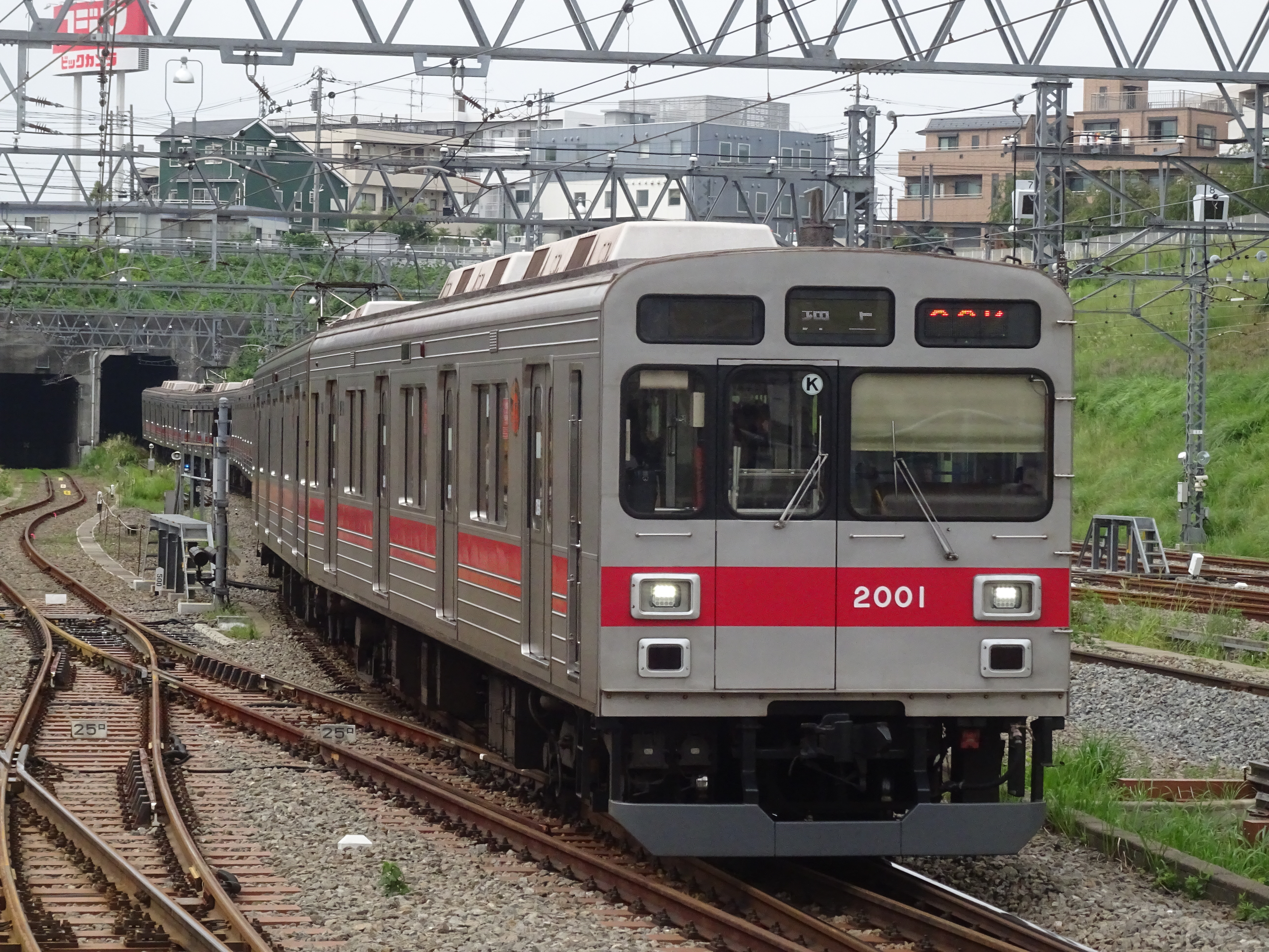 東急2000系